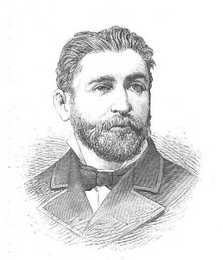 Aureliano Linares Rivas, ministro de gracia y justicia, publicado en la revista española La Ilustración Española y Americana.